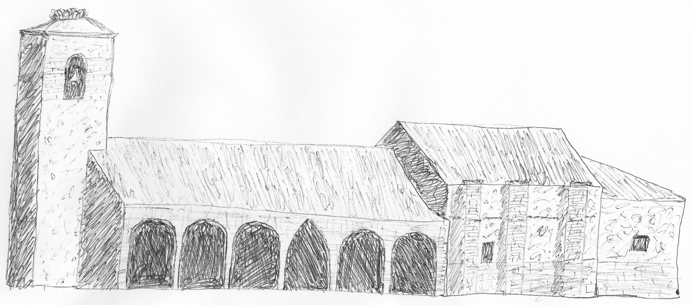 Dibujo de la iglesia de San Cristóbal (Castilblanco, Badajoz, 2014)